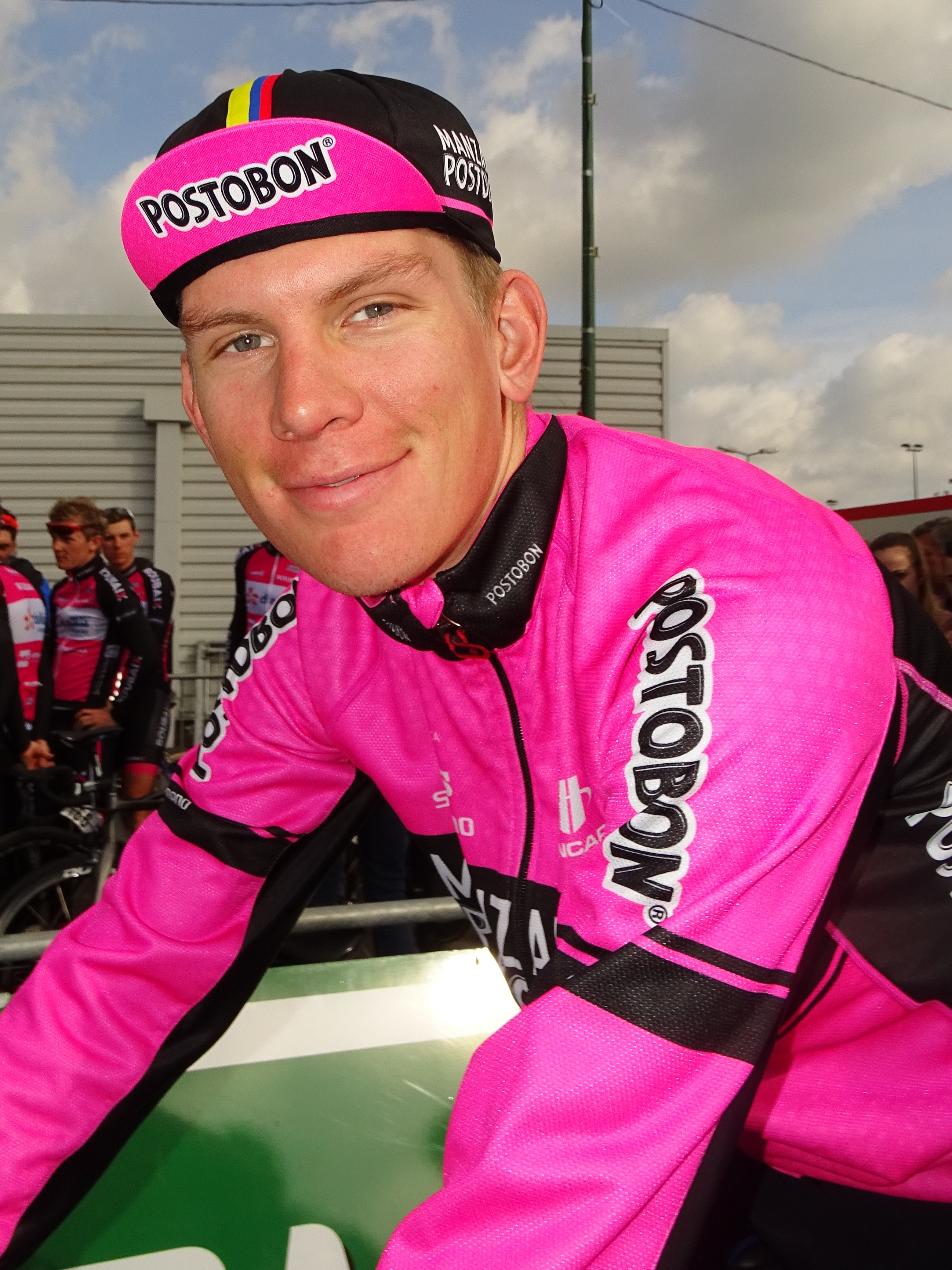 Reportage réalisé le jeudi 13 avril à l'occasion du départ et de l'arrivée du Grand Prix de Denain 2017 à Denain, Nord, Nord-Pas-de-Calais-Picardie, France.